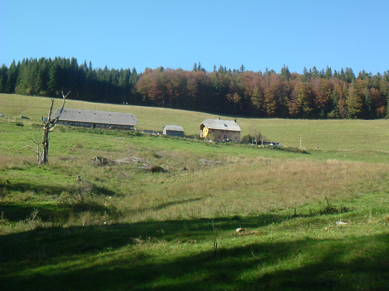 Blick auf die Erlenbacher Hütte beim Abstieg ins Wilhelmer Tal